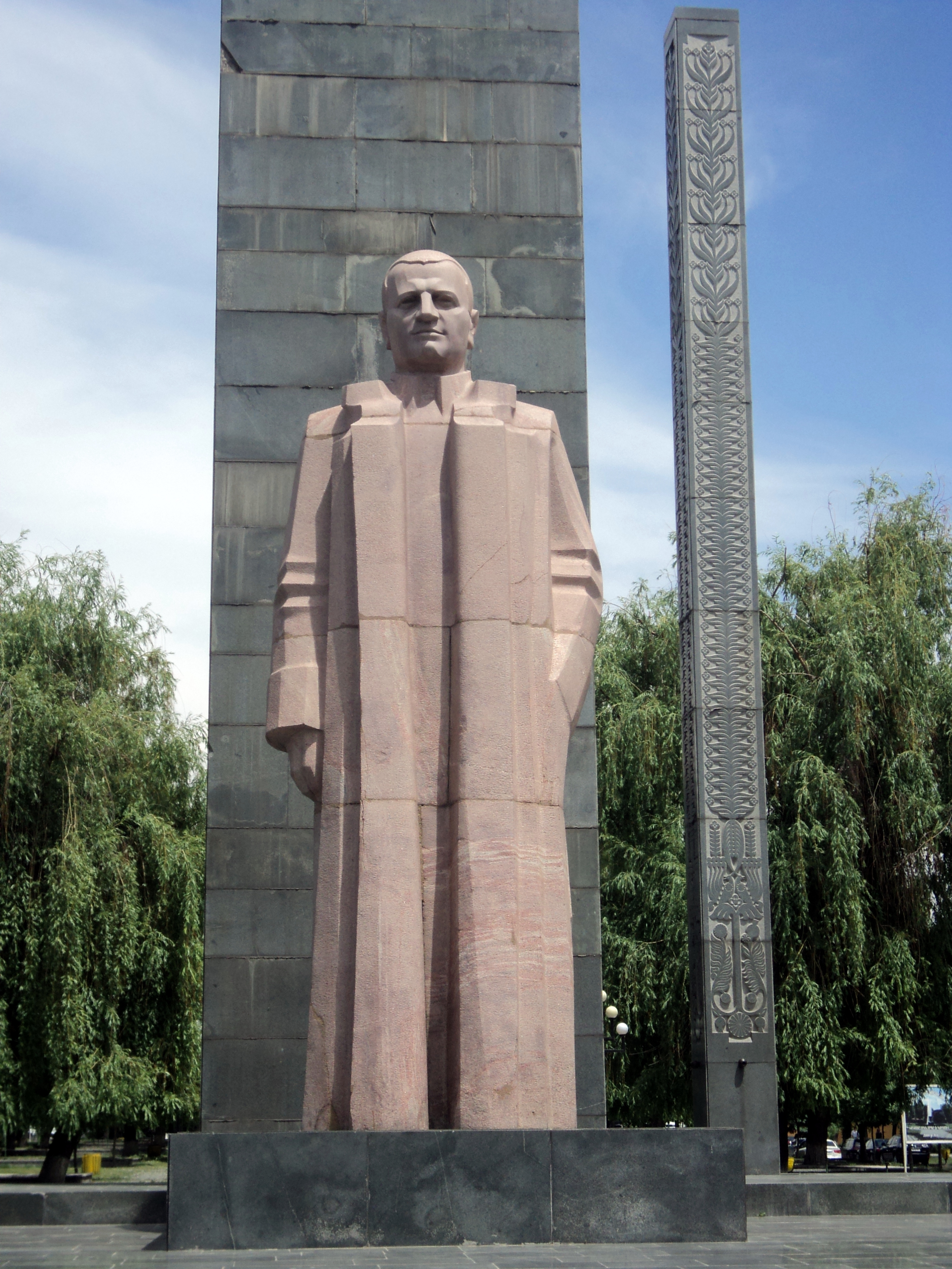 Հուշարձան` Ալեքսանդր Մյասնիկյանի 6/131